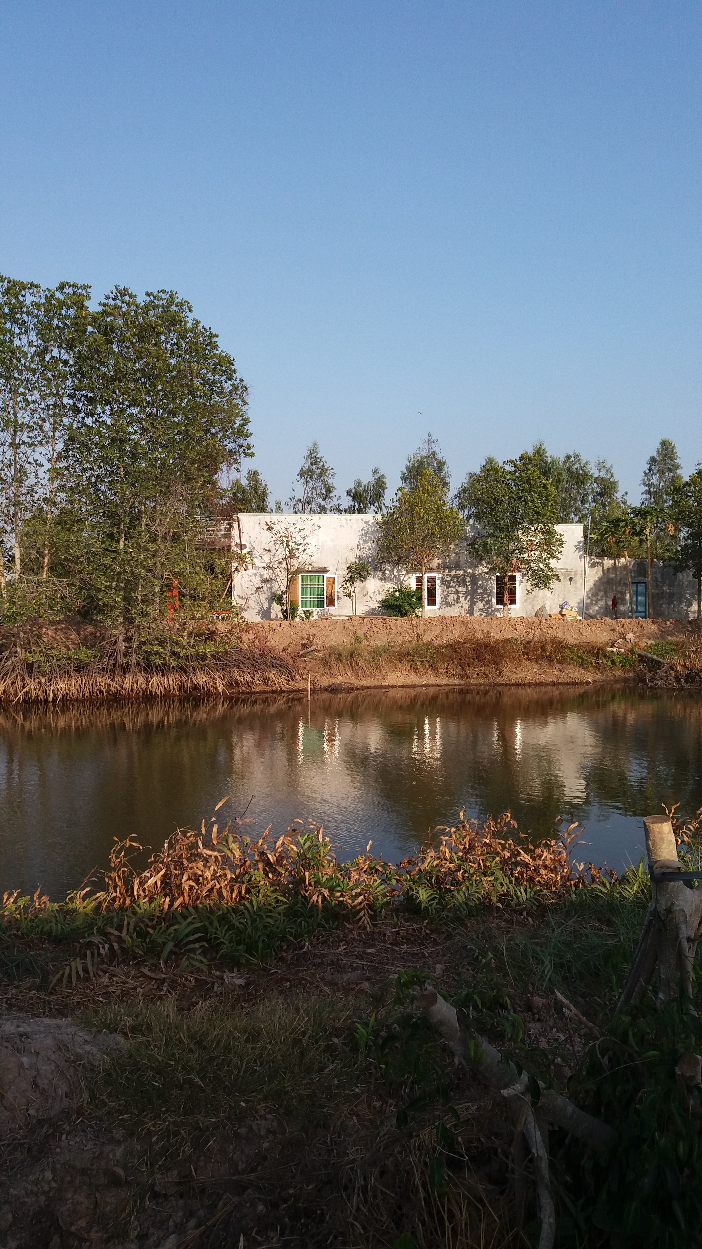 Một cái hồ để làm ngư nghiệp